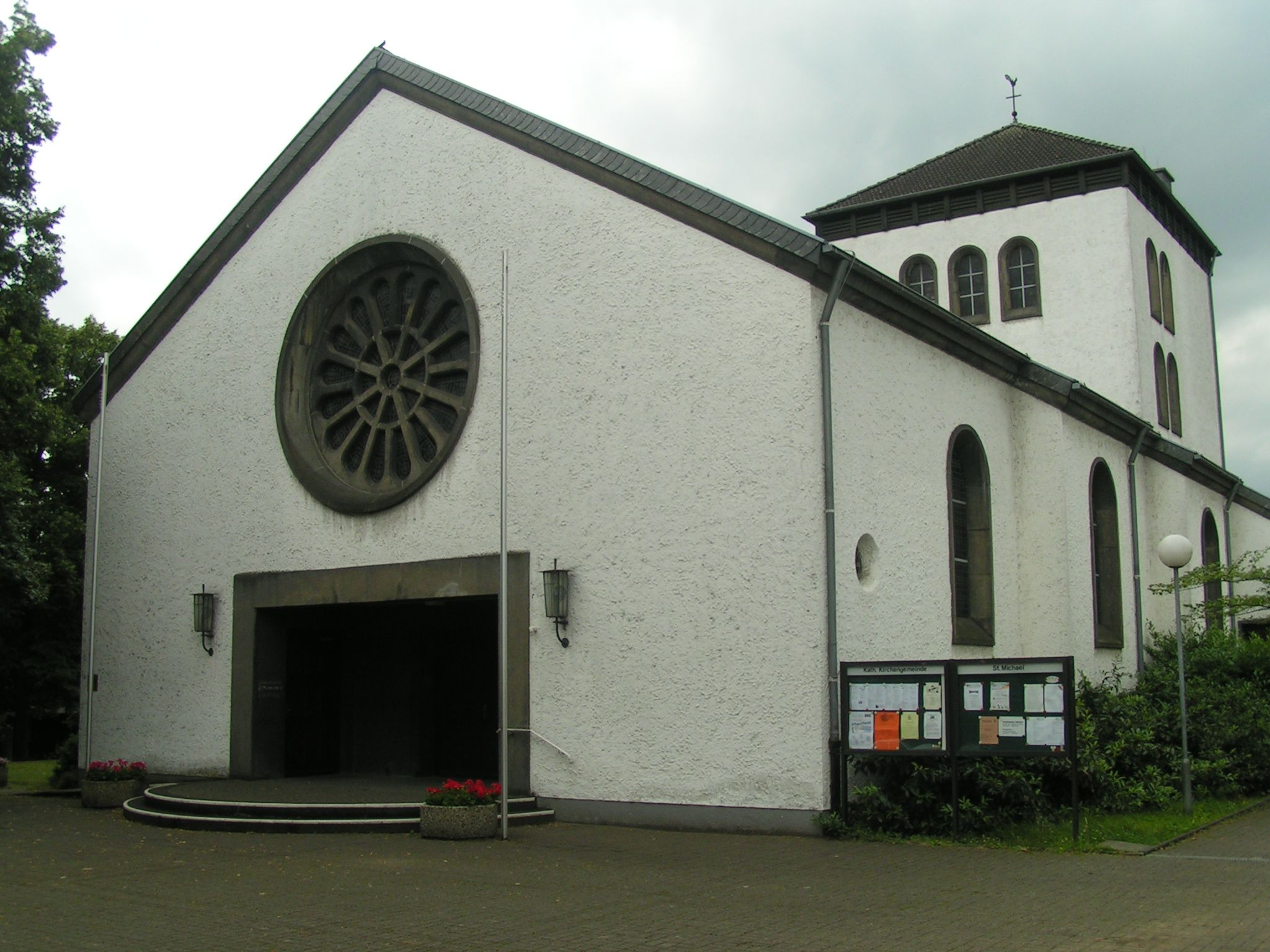 Kirche St. Michael in Leverkusen-Opladen, errichtet 1939.